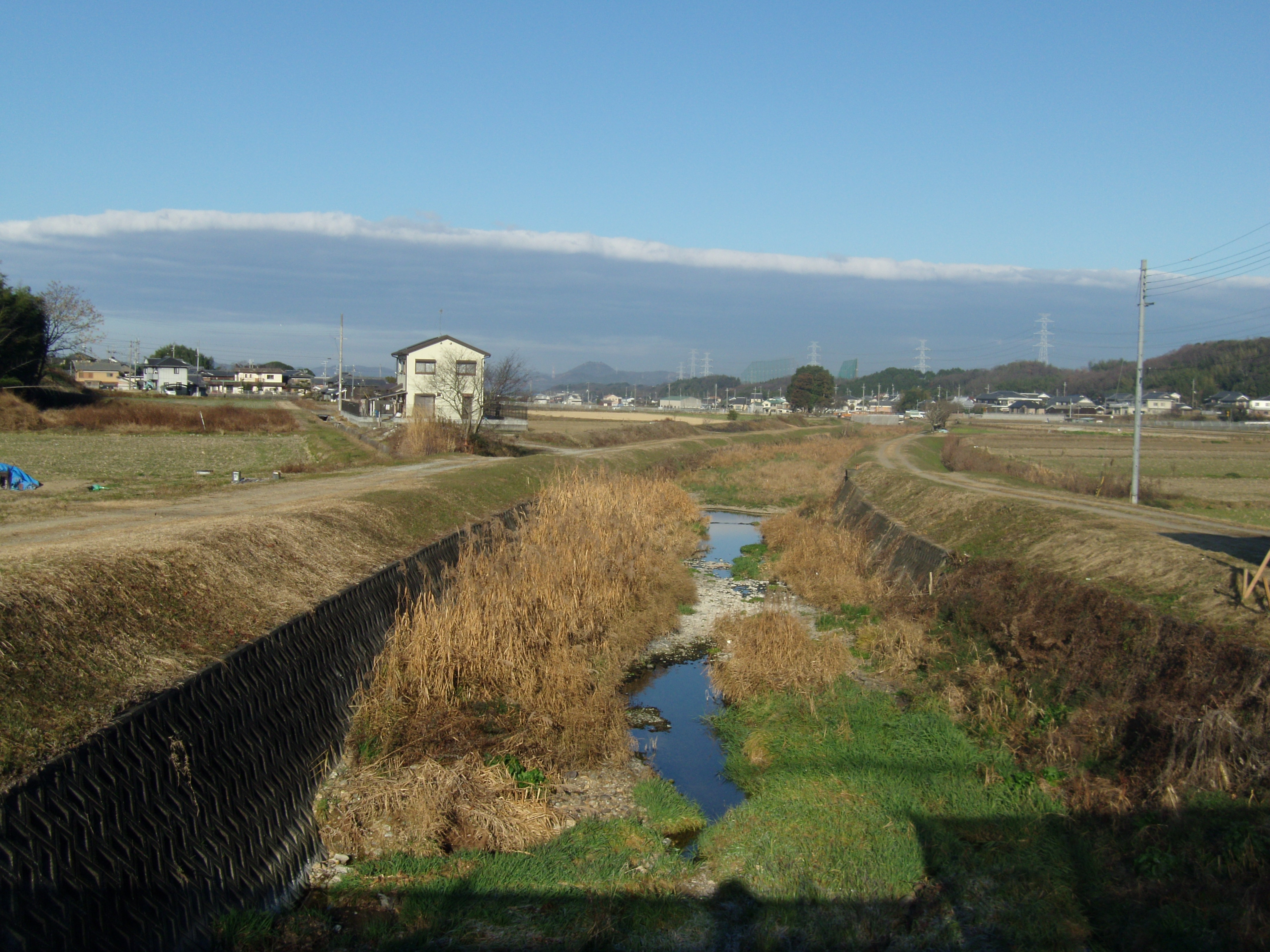 兵庫県稲美町草谷（古垣内）付近を流れる淡山疎水（淡河疎水）水系の草谷川支流、この先で加古大池に注ぐ